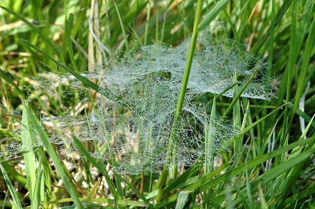 Neriene peltata web, from Commanster, Belgian High Ardennes .